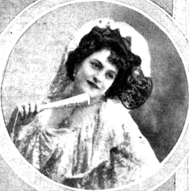 Fotografía de la cantante española María Conesa publicada en 1912 con motivo de la gira que estaba realizando por México, país en el que acabó por establecerse y desarrollar su carrera.